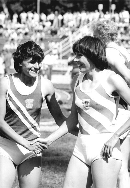 Bärbel Wöckel, Dagmar Rübsam ADN-ZB Ludwig--30.5.82 Erfurt: Beim traditionellen Pfingstsportfest der Leichtathtleten errang mit der Zeit von 49,56 die Olympiasiegerin Bärbel Wöckel vom SC Motor Jena (r.) im 400-m-Lauf den Sieg. Zu den ersten Gratulanten nach dem Zieleinlauf gehörte Dagmar Rübsam vom SC Turbine Erfurt.